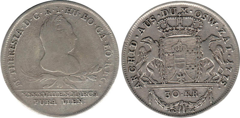 30 krajcarow 1775 KOZ